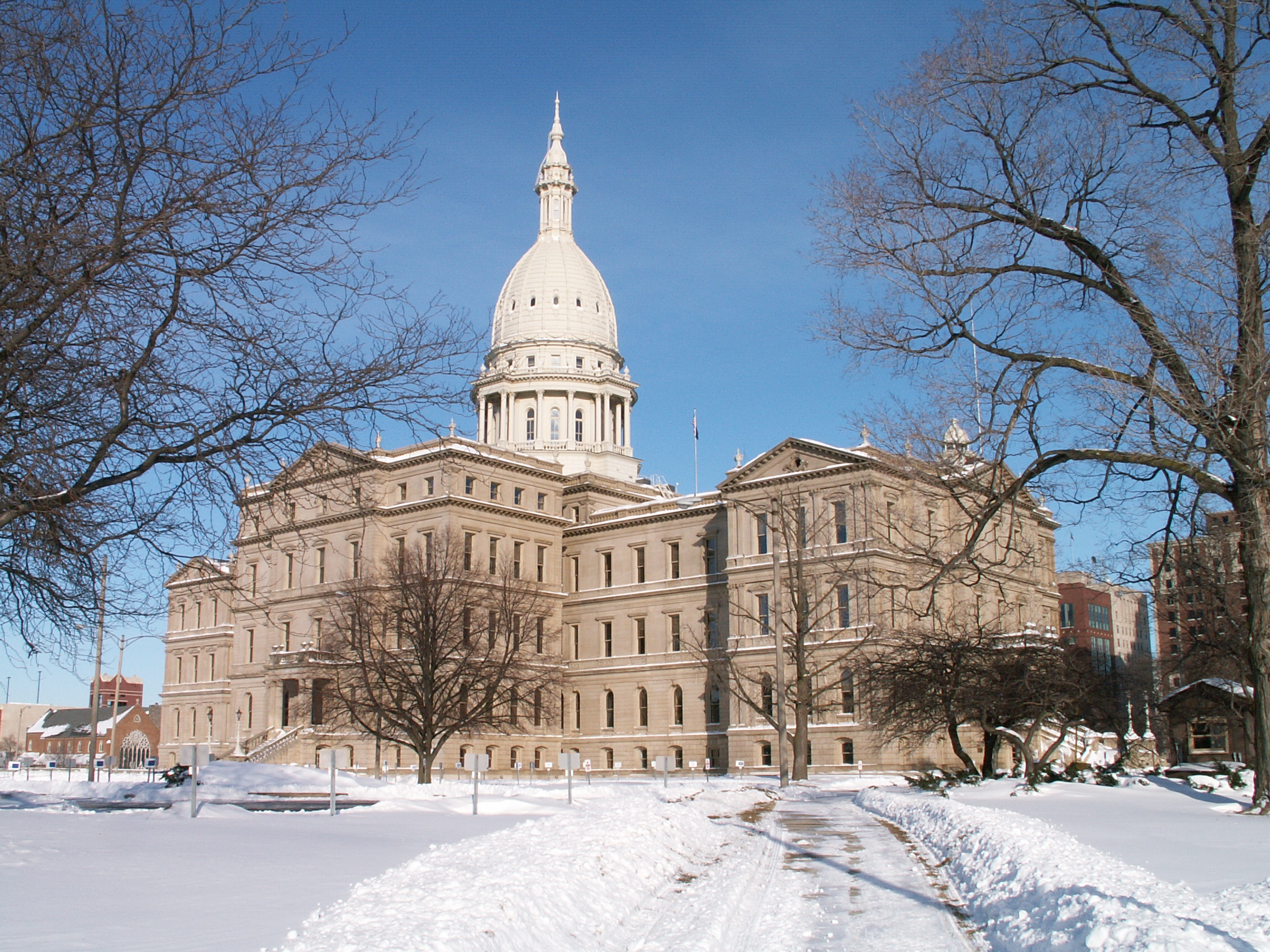 Michigan State Capitol, Lansing, Michigan La bildo estas kopiita de en.